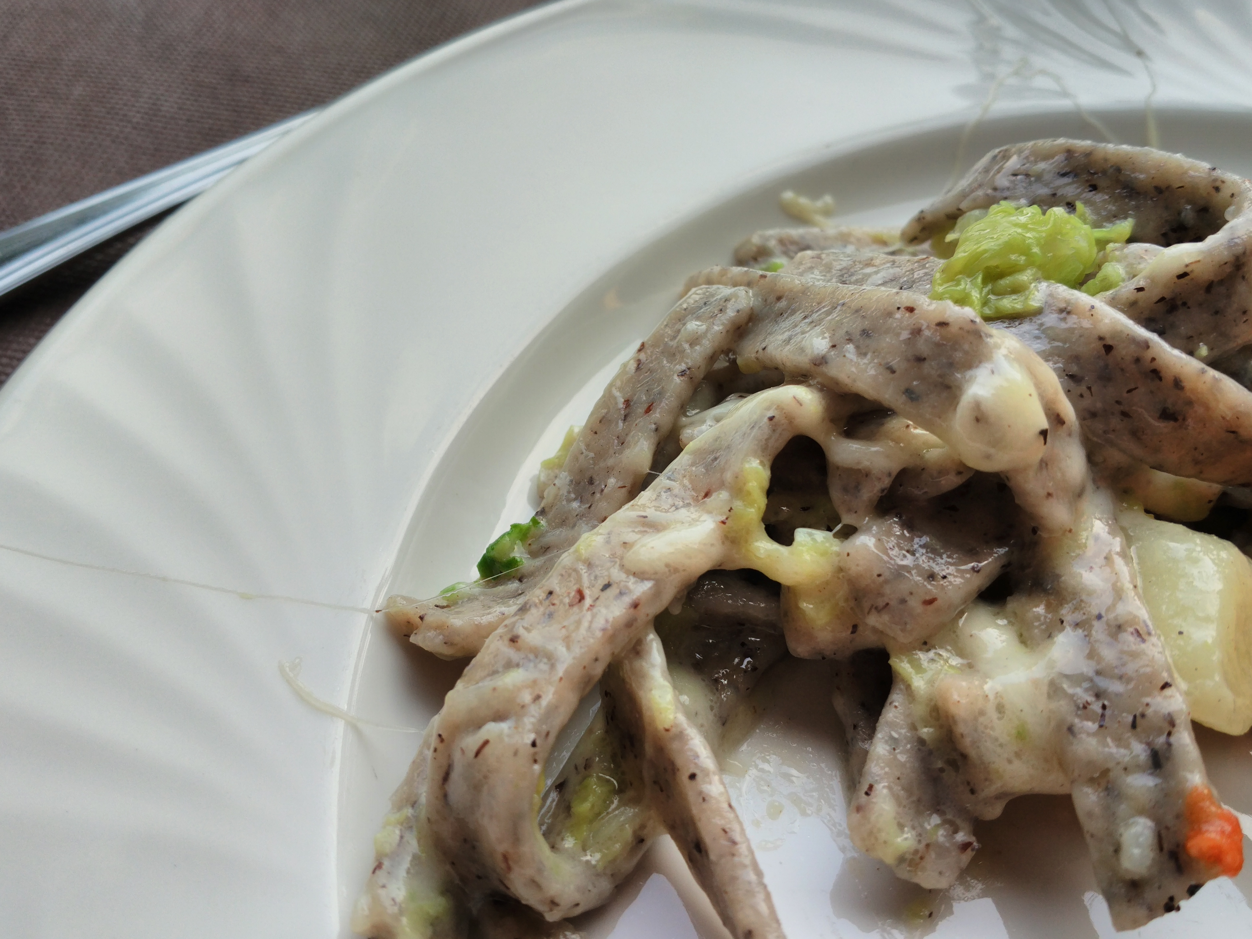 a closeup view of pizzoccheri pasta